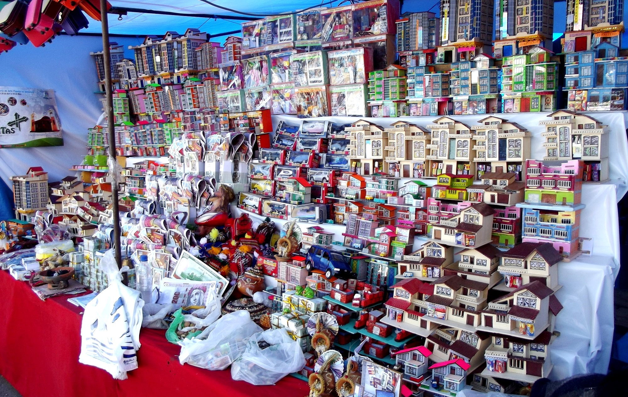 Miniaturas de la Feria de Alasitas de Puno - Patrimonio Cultural de la Nación - Perú